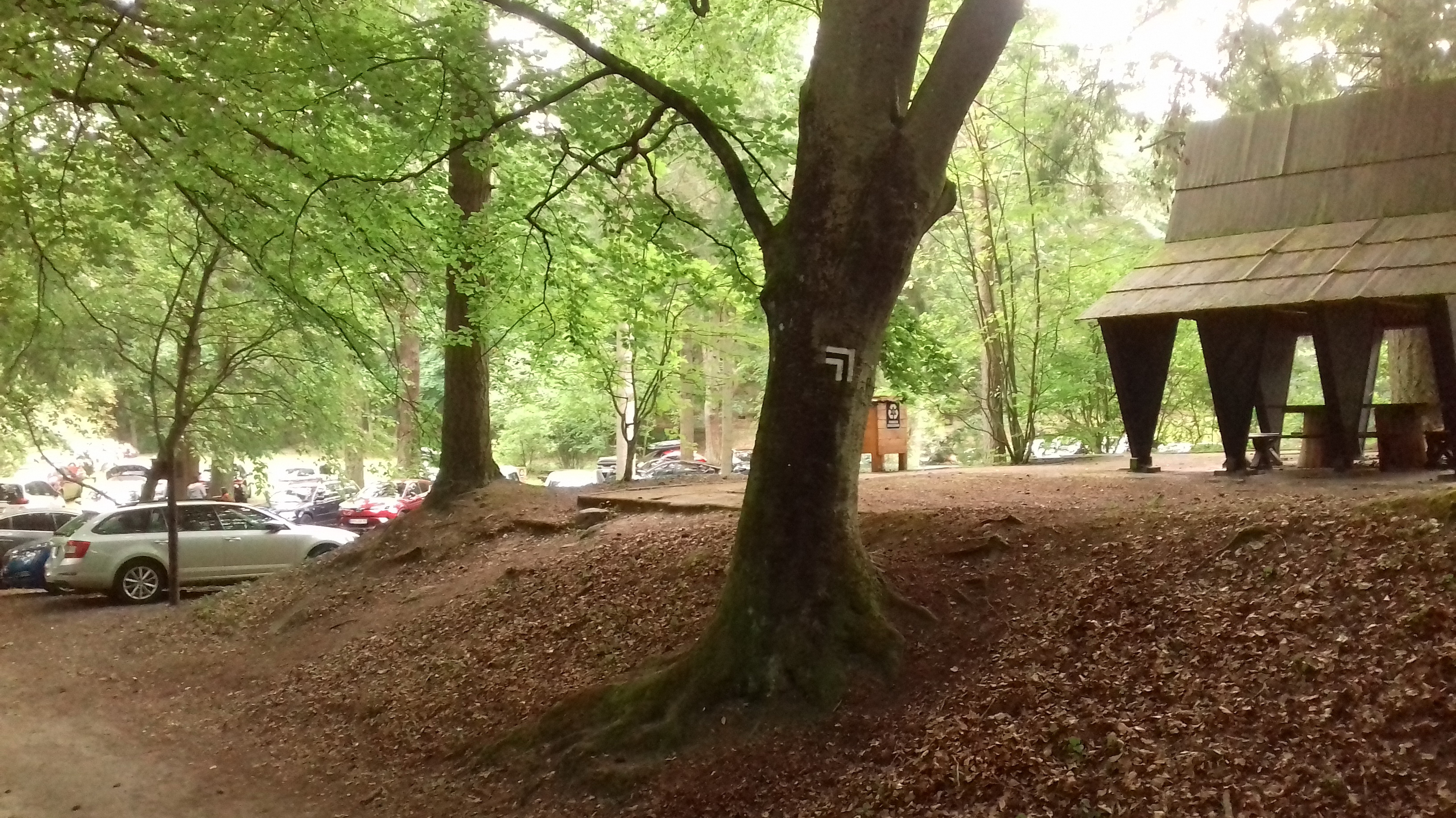 Oznaczenie szlaku pieszego nr 1002 koło parkingu Kwasowo